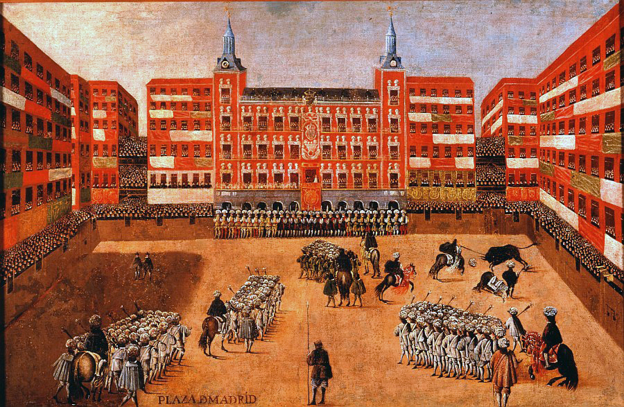 Vista de la Plaza Mayor en fiesta de toros, pintura anónima del siglo XVII, conservada en el Museo de Historia de Madrid, España.